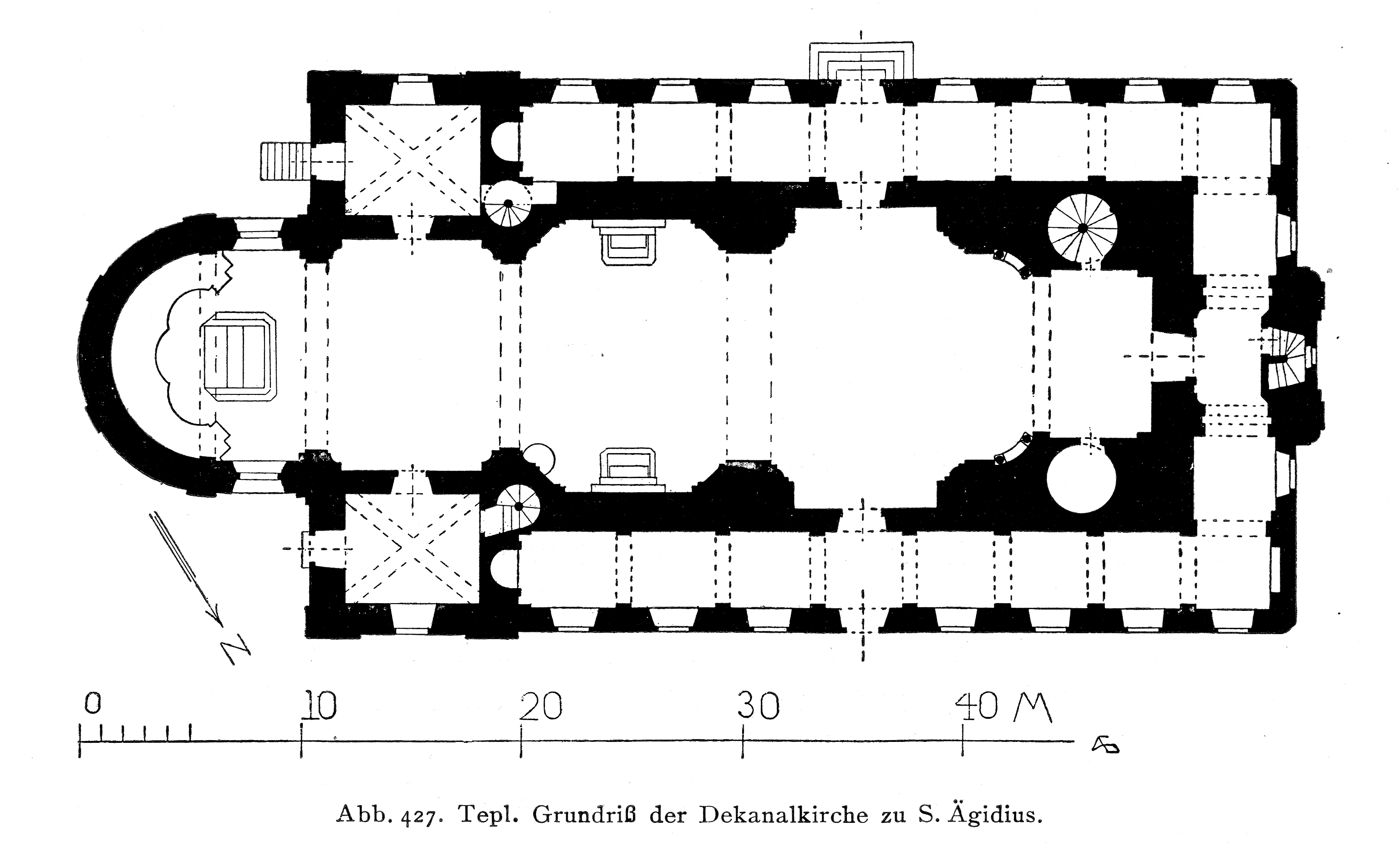 Abb. 427. Tepl. Grundriß der Dekanalkirche zu S. Ägidius.